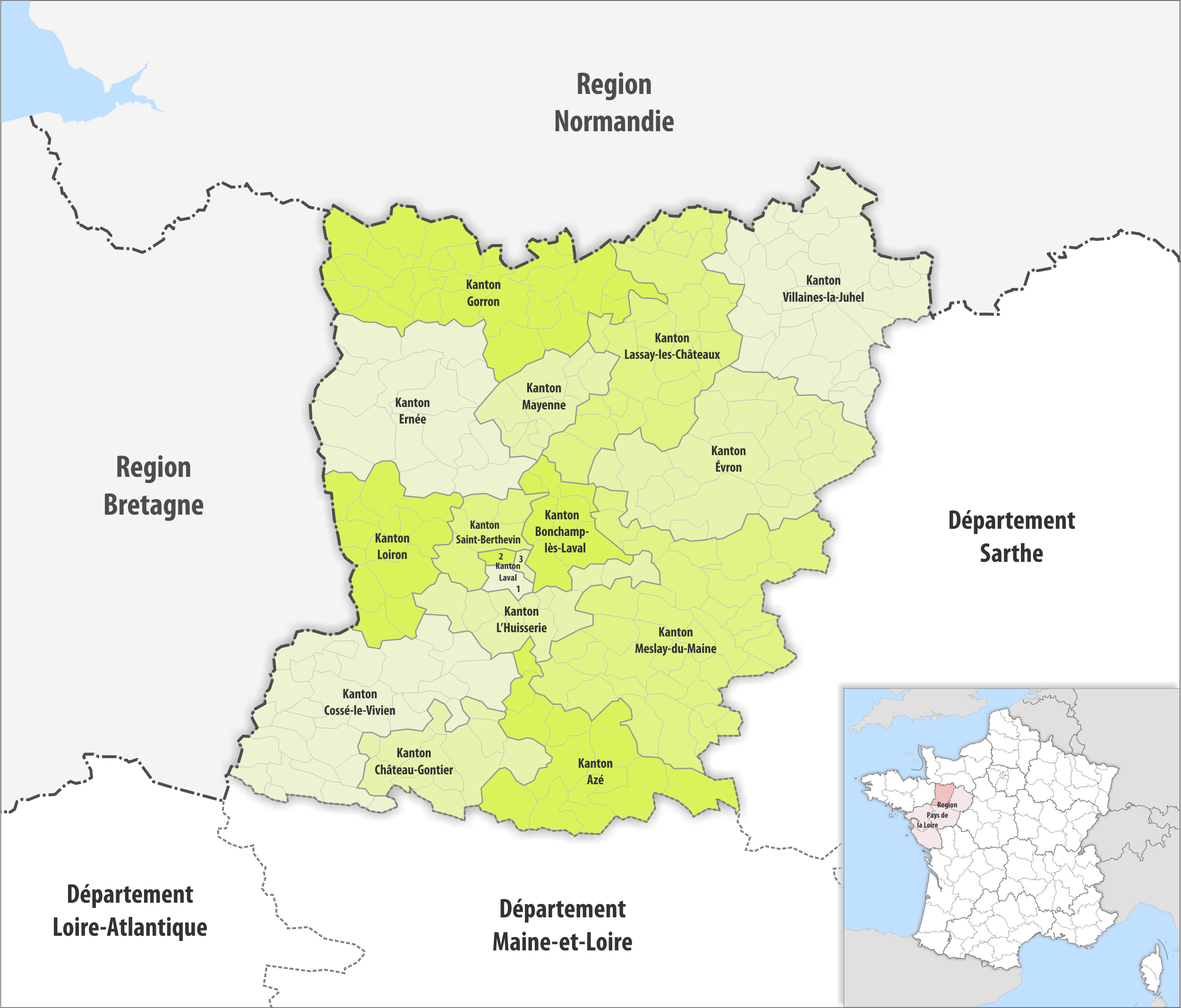 Gemeinden und Kantone im Departement Mayenne